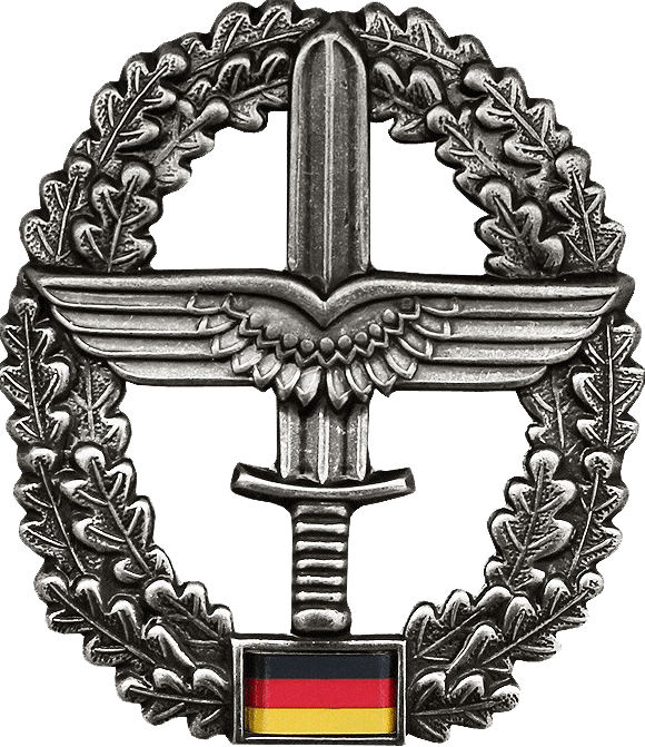 Barettabzeichen der Heeresfliegertruppe der Bundeswehr Barettfarbe: Bordeauxrot Maße: Hoch: 53mm Breit: 46mm Ausführung: altsilber, Metall